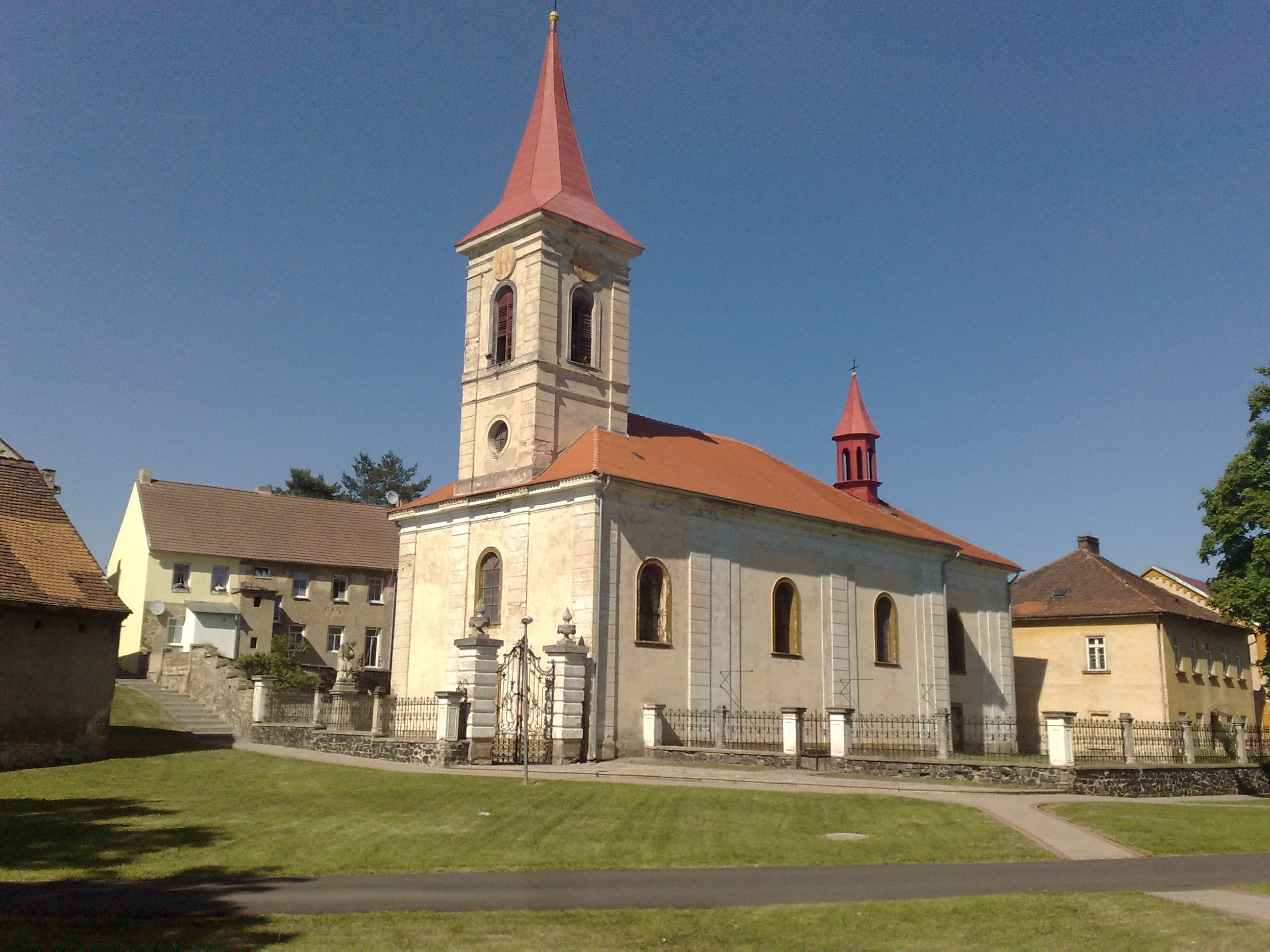 Kostel svatého Apolináře v obci Modlany na Teplicku.